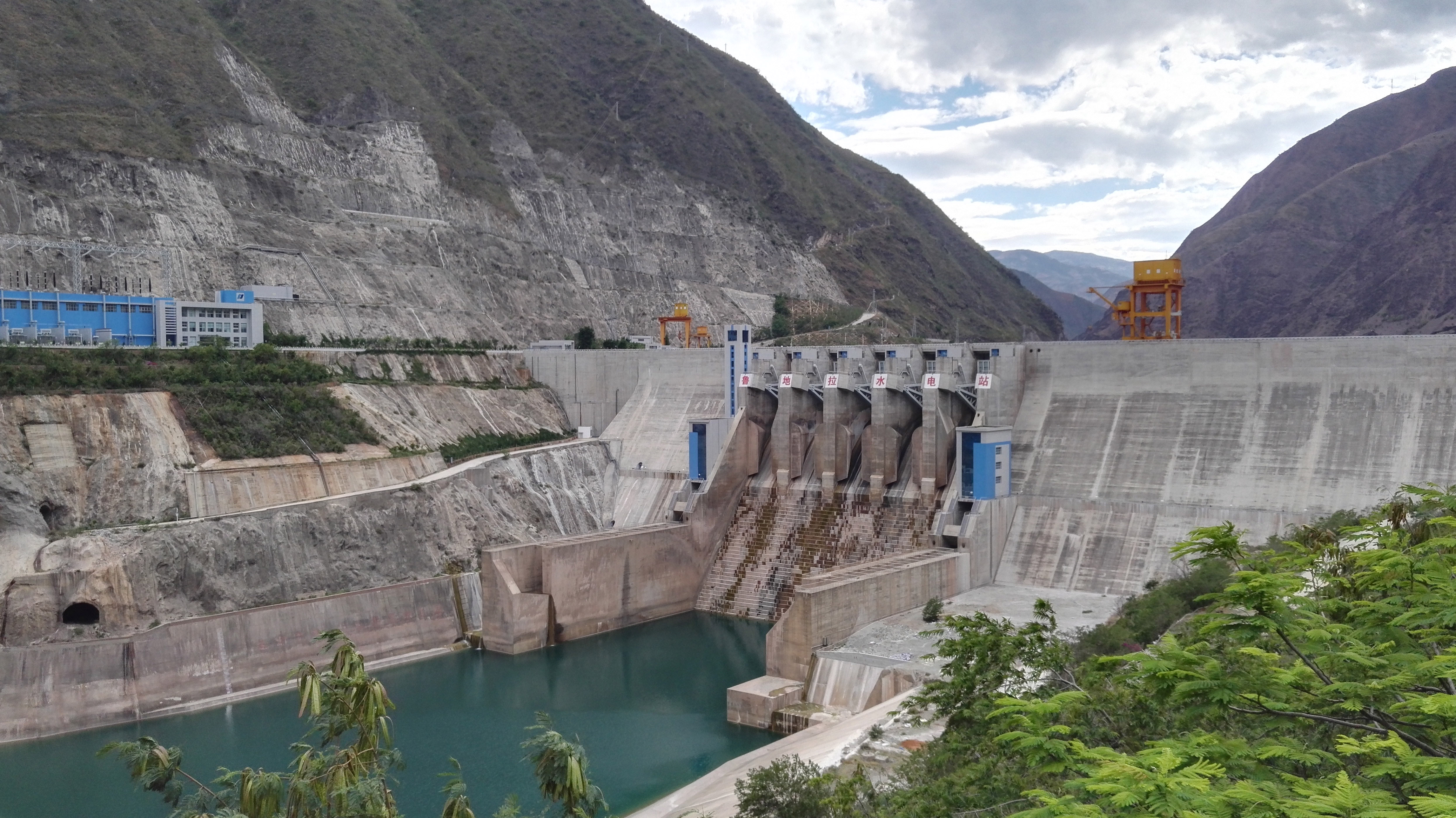 鲁地拉大坝